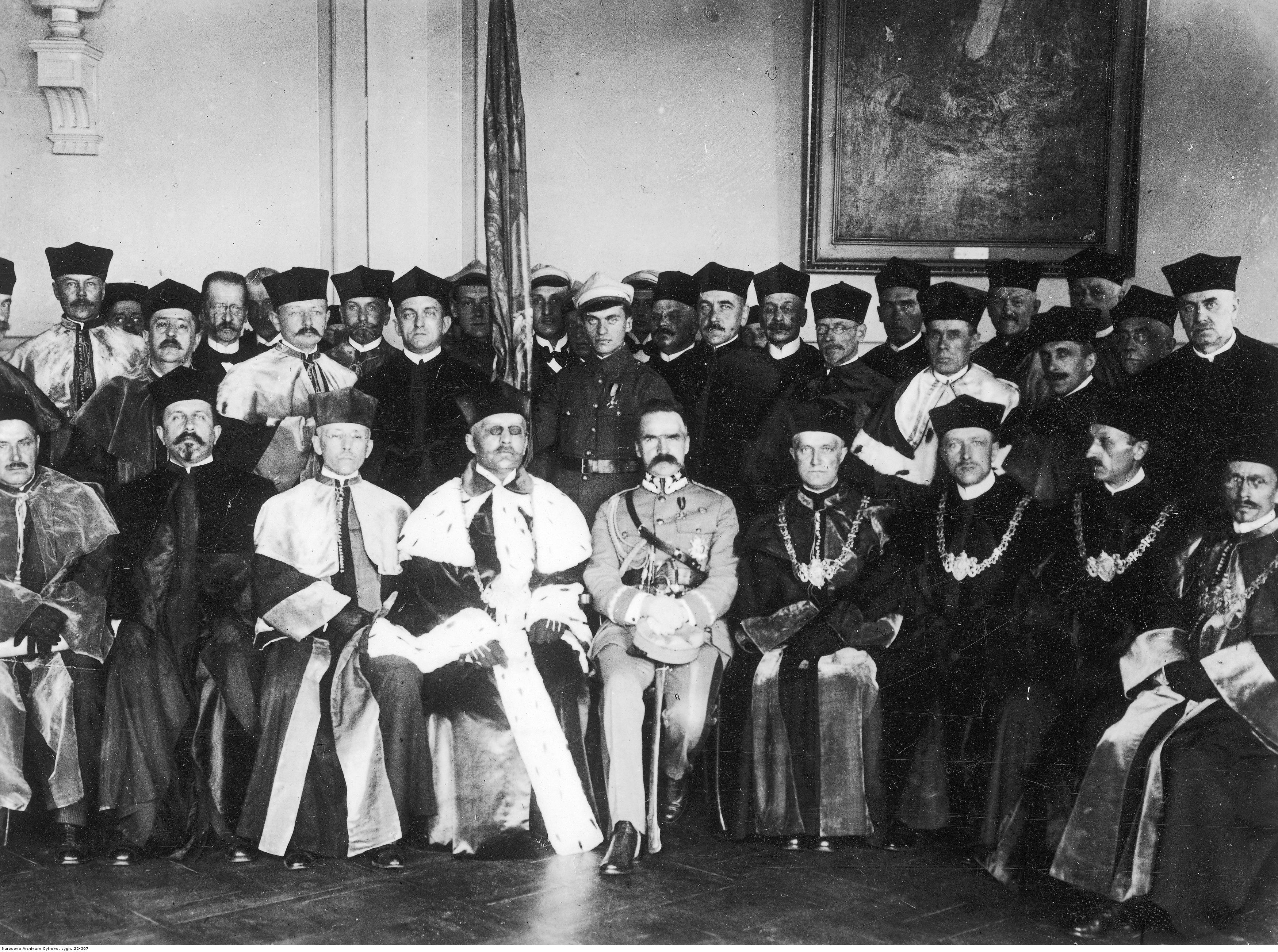 Marszałek Józef Piłsudski w otoczeniu profesorów i studentów Uniwersytetu Warszawskiego. Widoczni m.in.: rektor UW, prof. Jan Karol Kochanowski (na lewo od marszałka), prof. Jan Mazurkiewicz (na prawo od marszałka), prof. Stanisław Szober (I rząd, 1 z prawej).